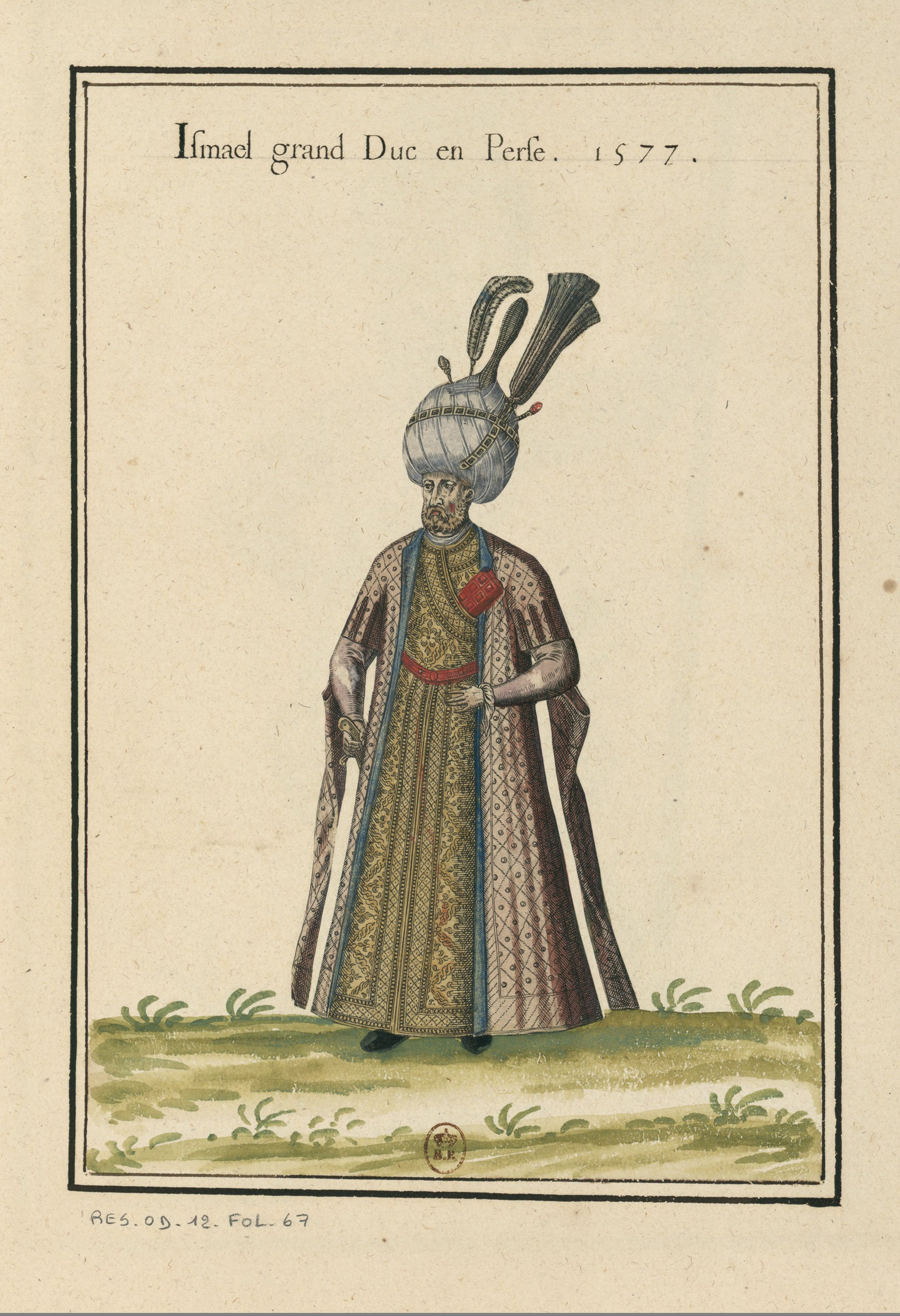 Ensemble de gravures de costumes de Turquie du XVIe siècle